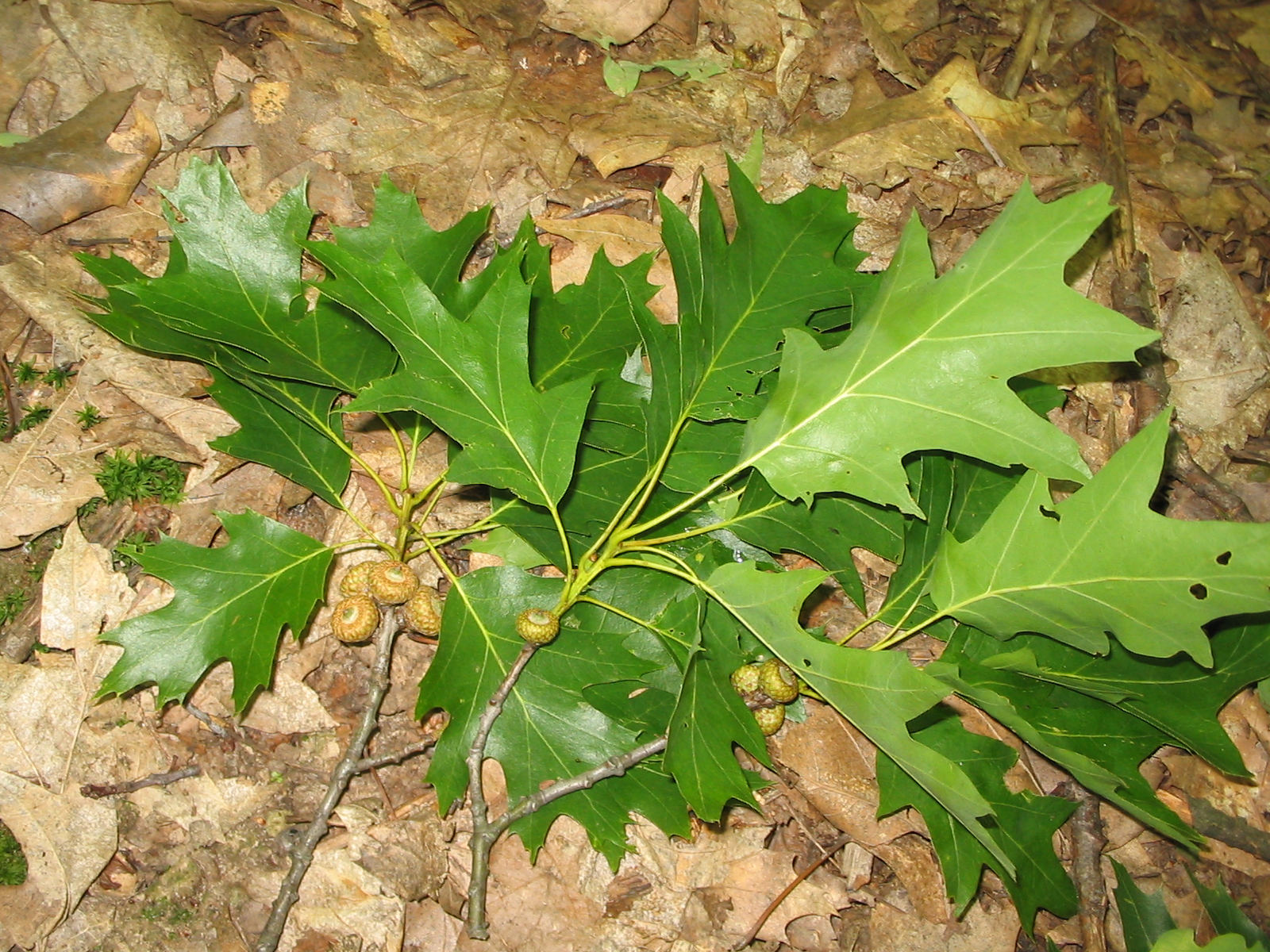 Гілка дуба червоного (Q. rubra L.)